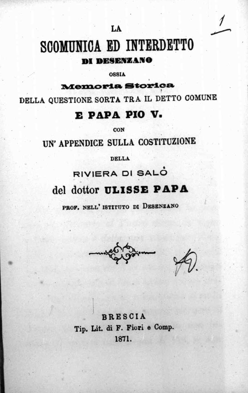 Frontespizio